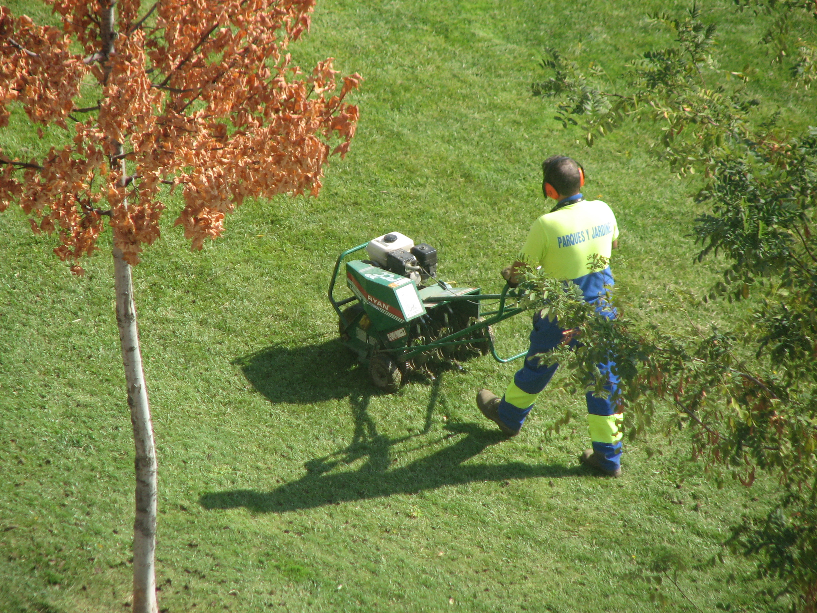 Aireadora con motor térmico, Ryan Lawnaire IV